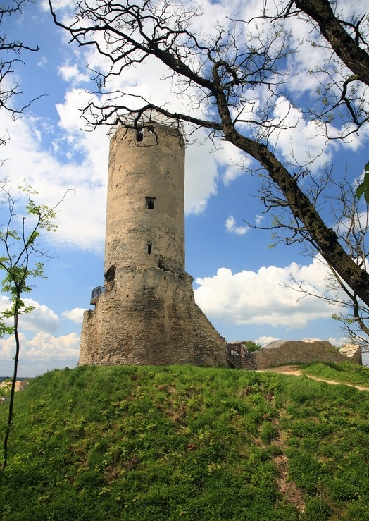 Château de Iłża.